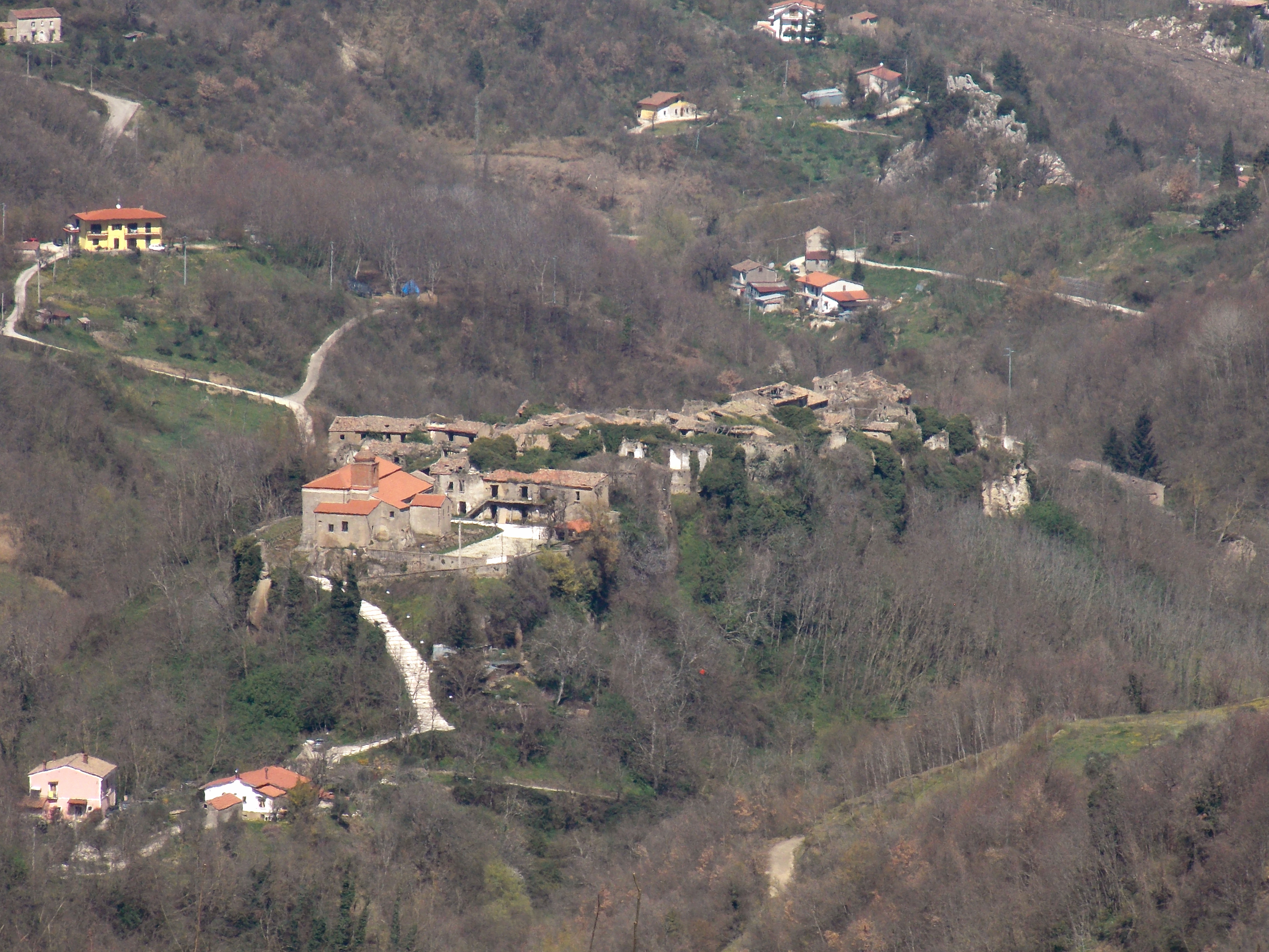 Il vecchio centro,ora abbandonato, di Tocco Caudio (BN) visto dalla strada che conduce al monte Taburno